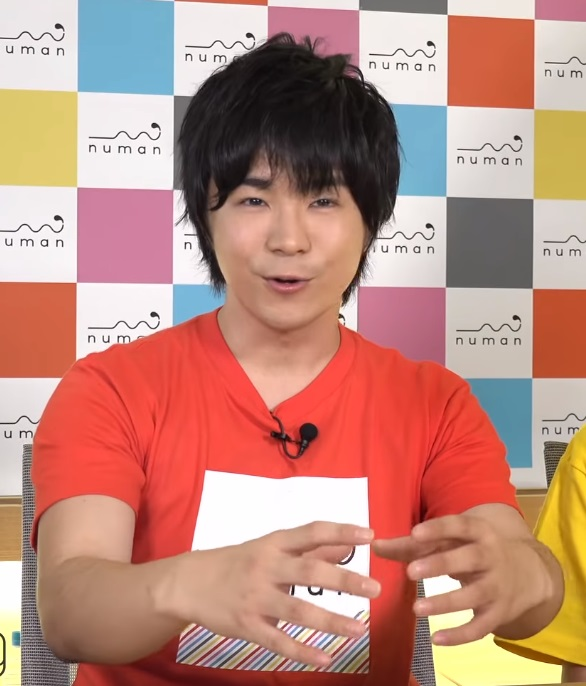 村上喜紀（『ぬまてれ☆』第1回より）